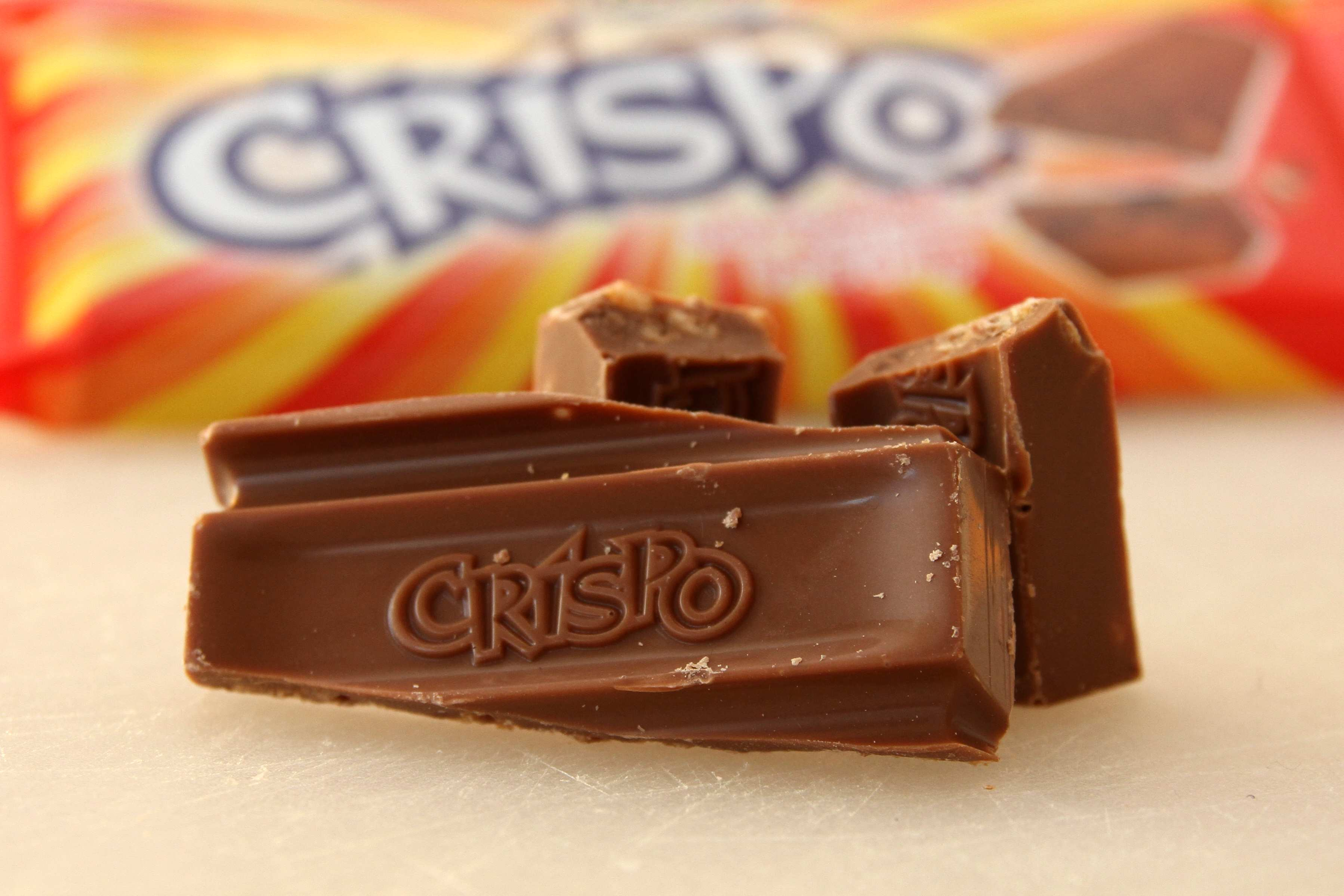 Sjokoladen Crispo.